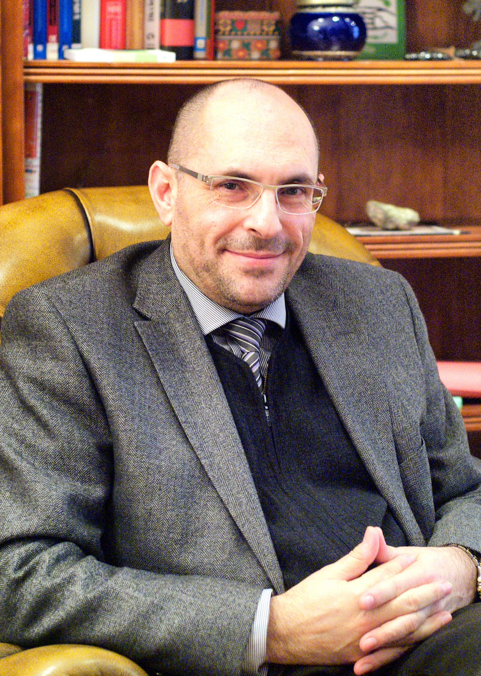 Foto:Elpidio Jose Silva Pacheco